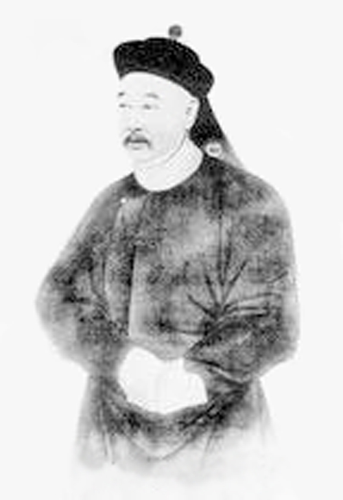 朴寿，清朝官员